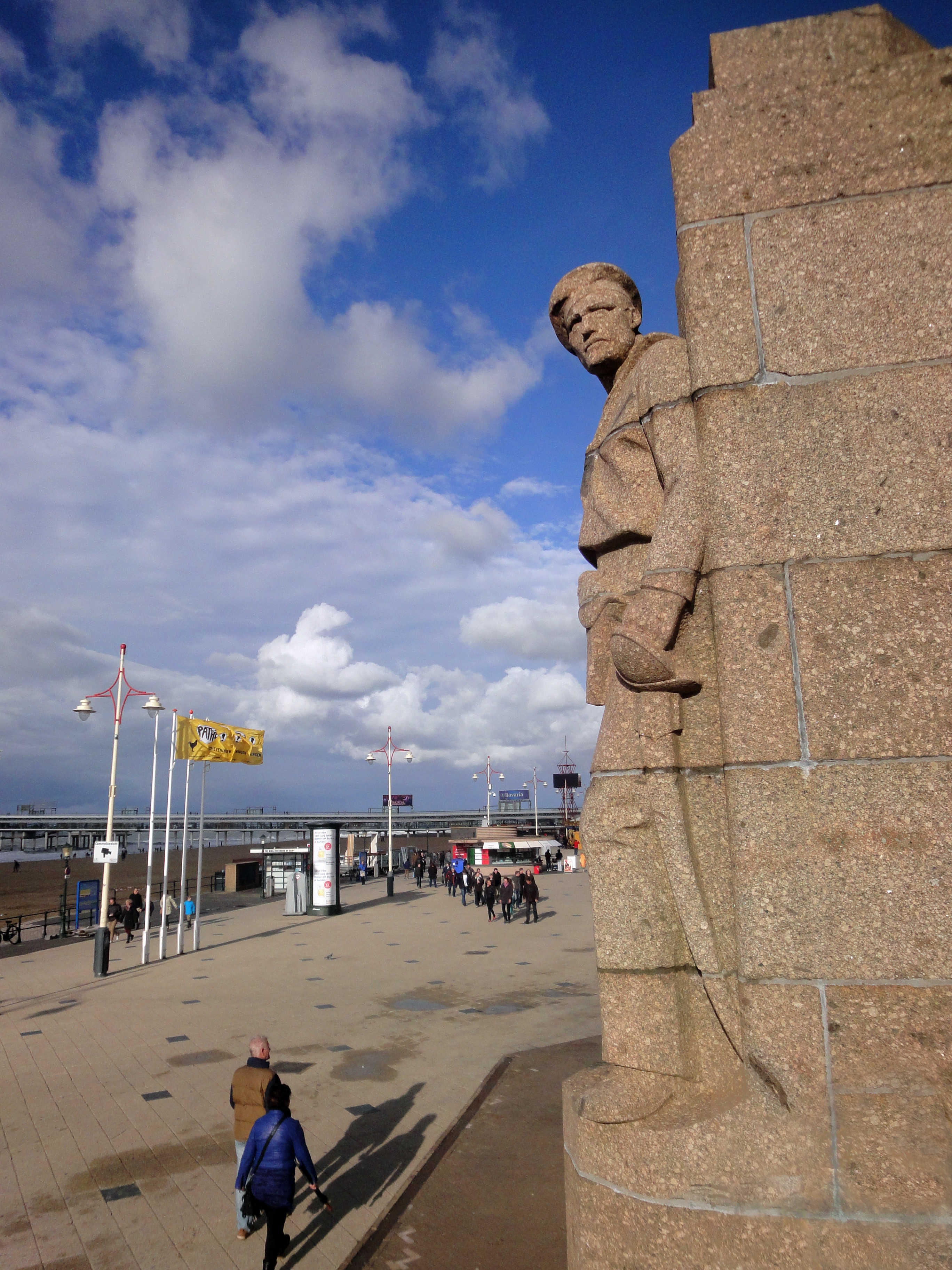 WW1 monument at Scheveningen